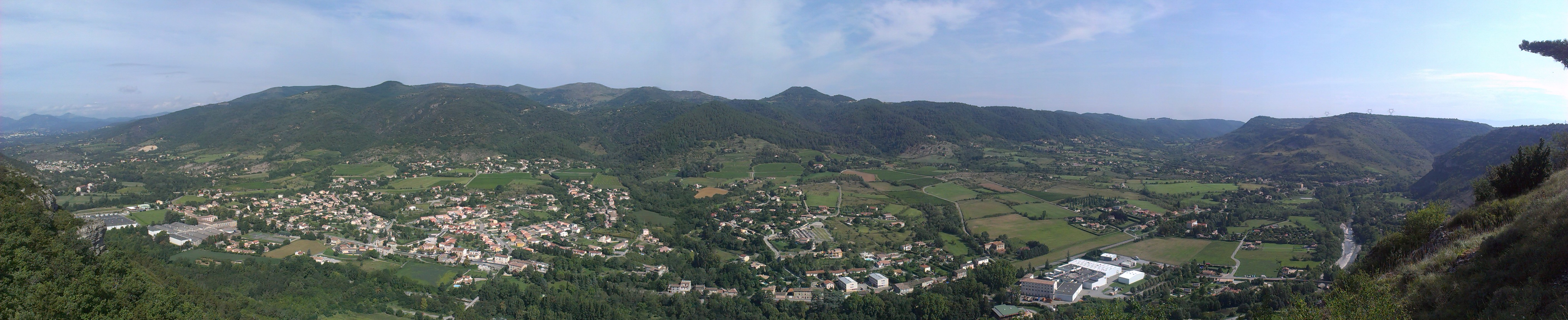 Vue générale sur Saint-Julien-en-Saint-Alban, Rompon, etc. depuis le château de Saint-Alban